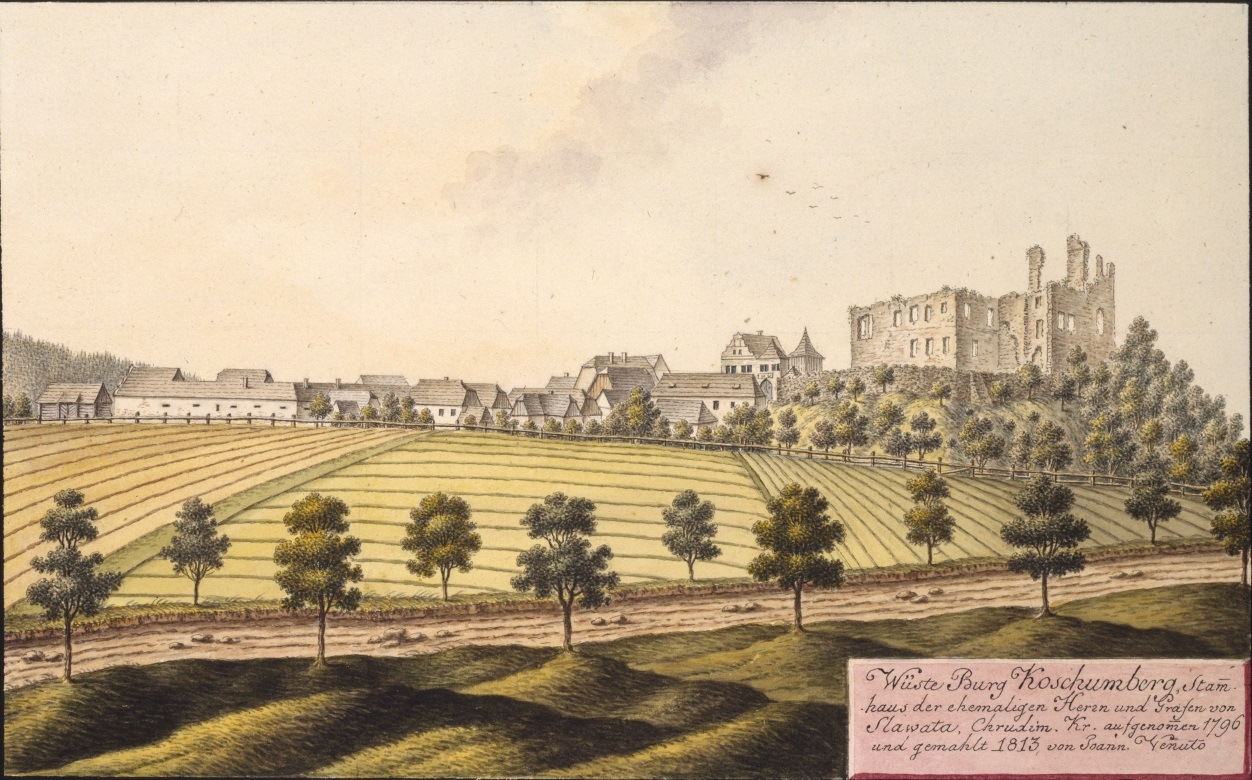 Hrad Košumberk. Wüste Burg Koschumberg, Stammhaus der ehemaligen Herrn und Grafen von Slawata. Chrudim. Kr. aufgenommen 1796 und gemahlt 1813